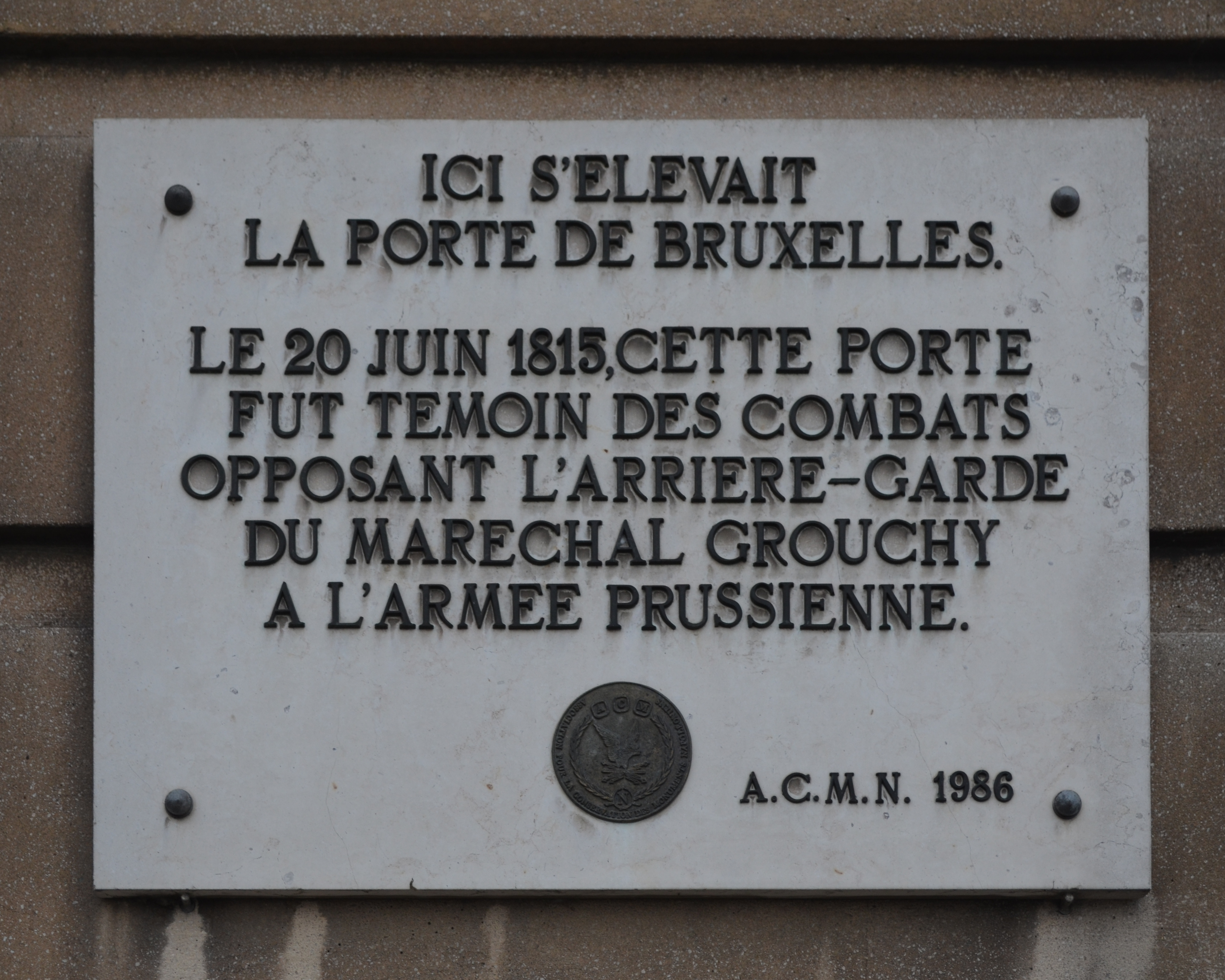 Texte : Ici s'élevait la porte de Bruxelles.Le 20 juin 1815, cette porte fut témoin des combats opposant l'arrière-garde du maréchal Grouchy à l'armée prussienne.A.C.M.N. 1986